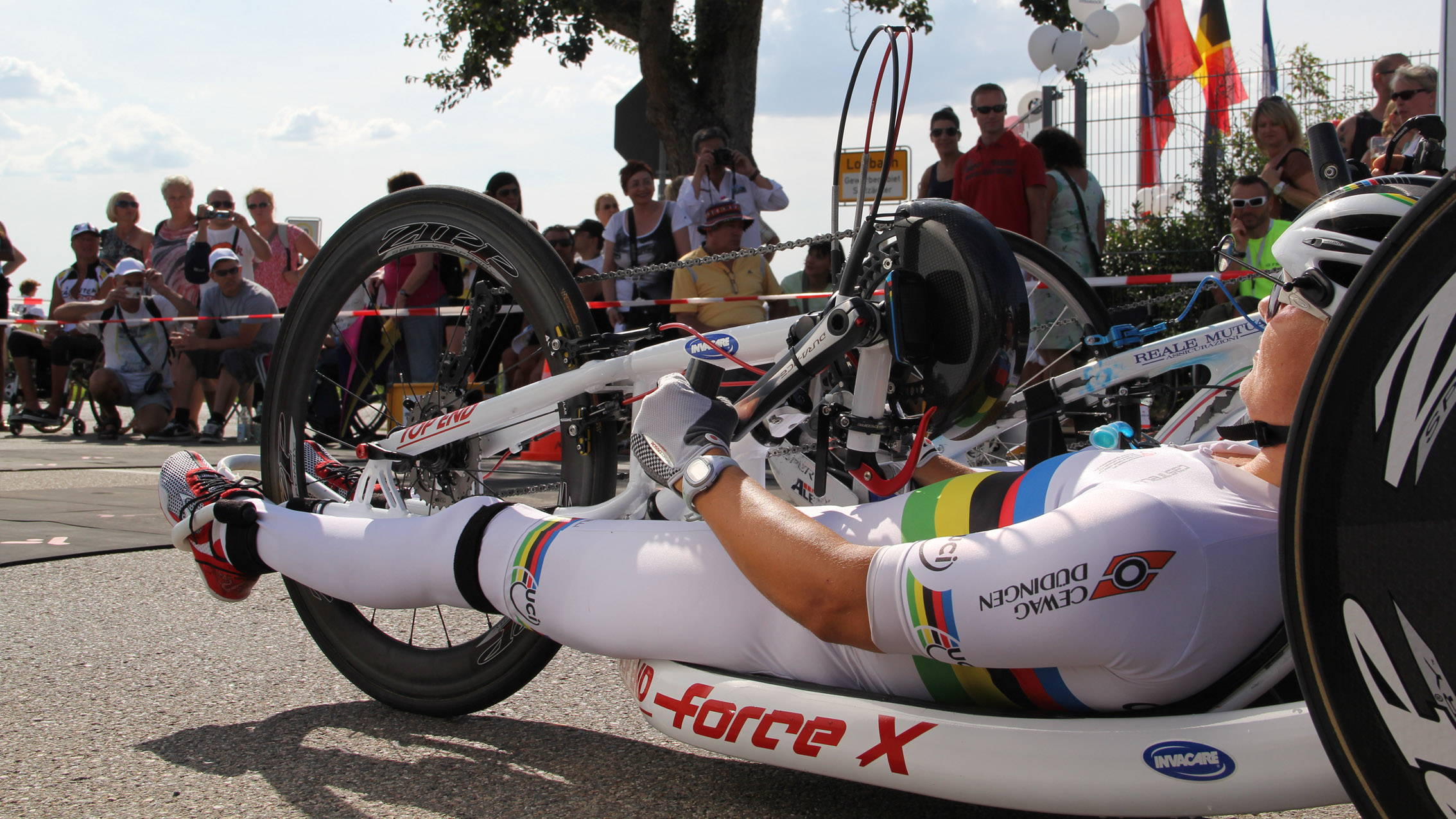 Start Strassenrennen Lobbach 2012